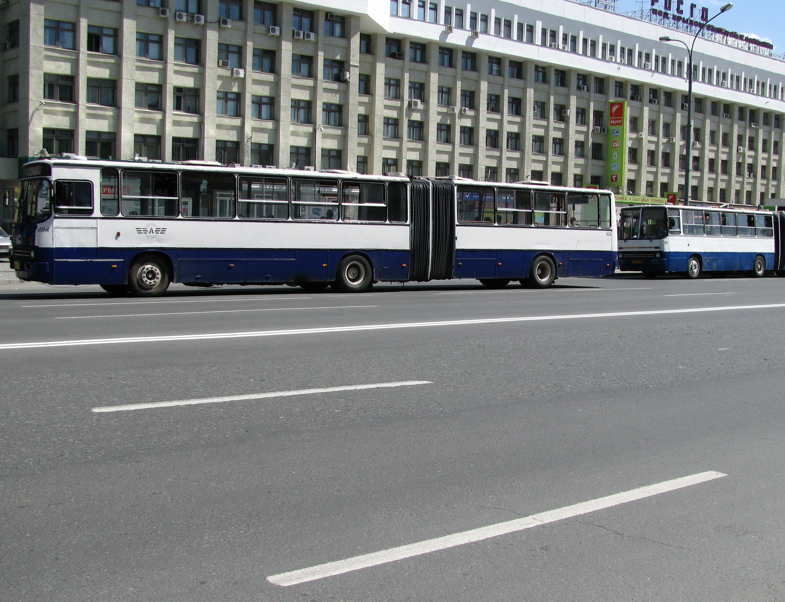 Икарус-283 — основа автобусного парка Екатеринбурга.